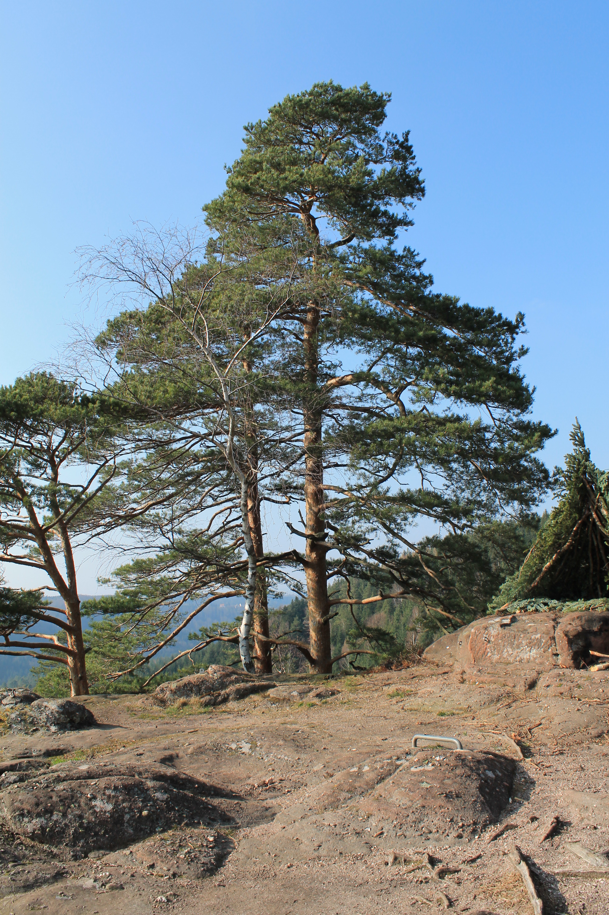 Pin sylvestre sur rocher du Hohwalsch Moselle